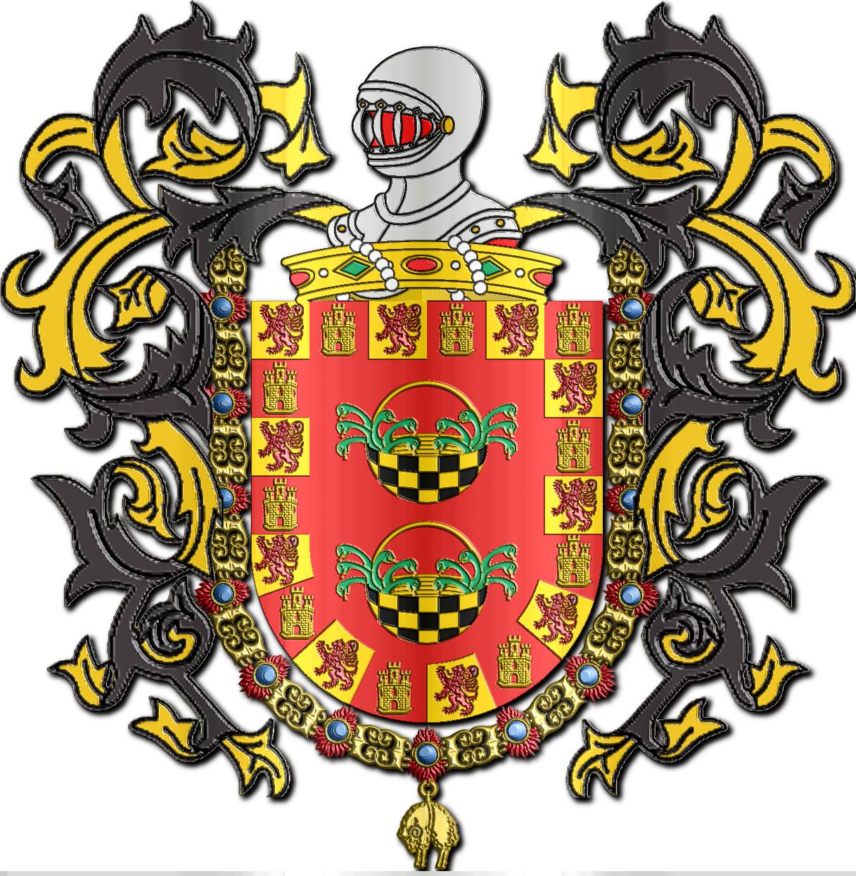 En campo de gules dos calderas jaqueladas de oro y sable puestas en palo con seis sierpes de sinople salientes, tres de cada lado de las asas. Bordura jaquelada de seis leones de gules en campo de oro, alternando con seis castillos de oro en campo de gules. Adornado con el collar de la Orden del Toisón de Oro.